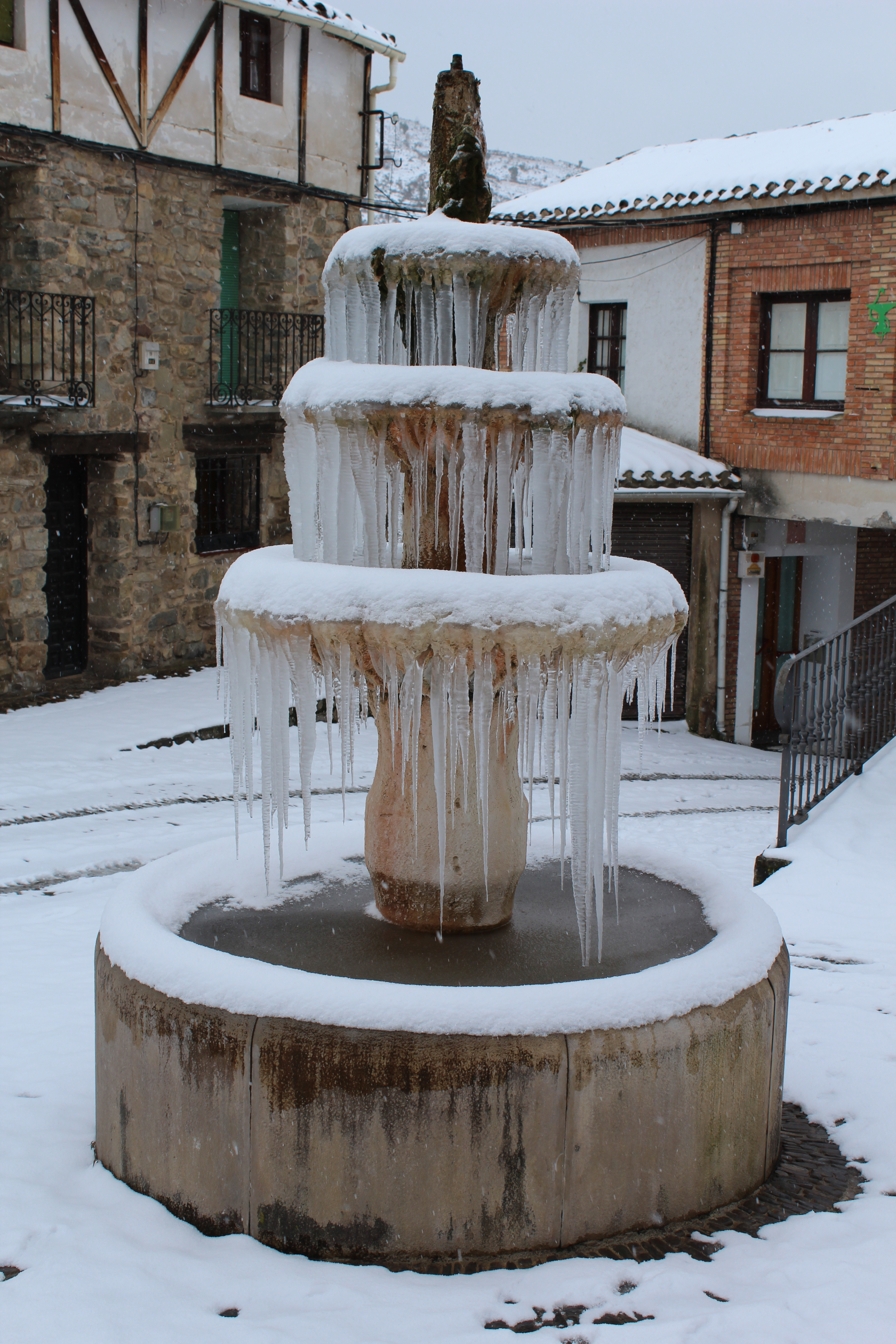 La fuente de la plaza de San Román de Cameros helada